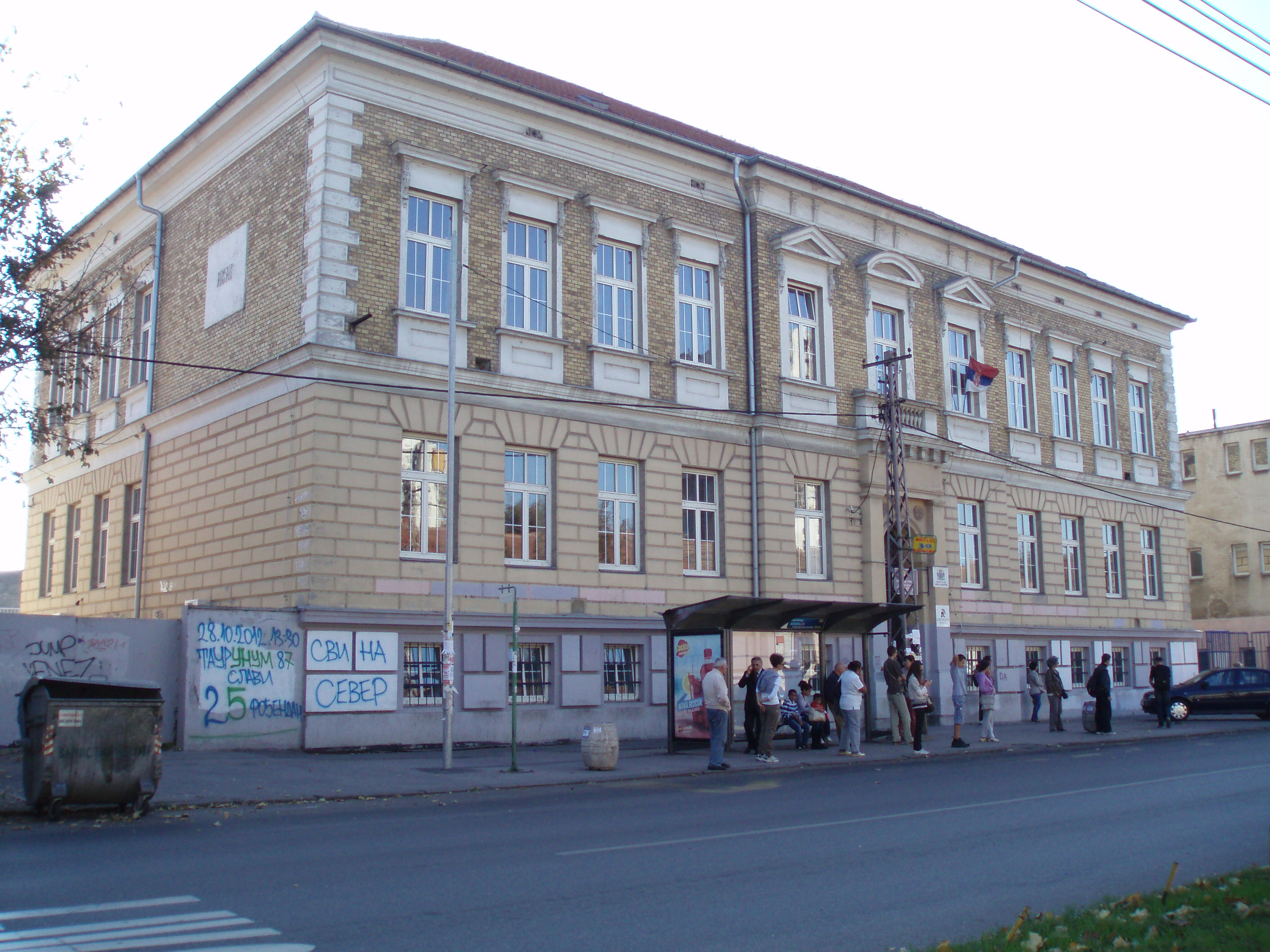 Osnovna škola Kraljica Marija u Zemunu, autor fotografije: Nicolo